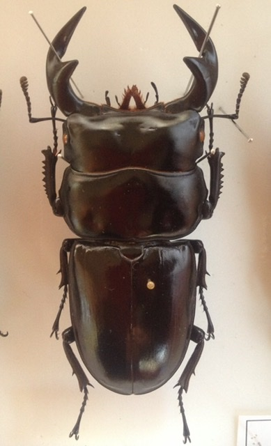 アンタエウス タイ産 87.1㎜ ギネス1